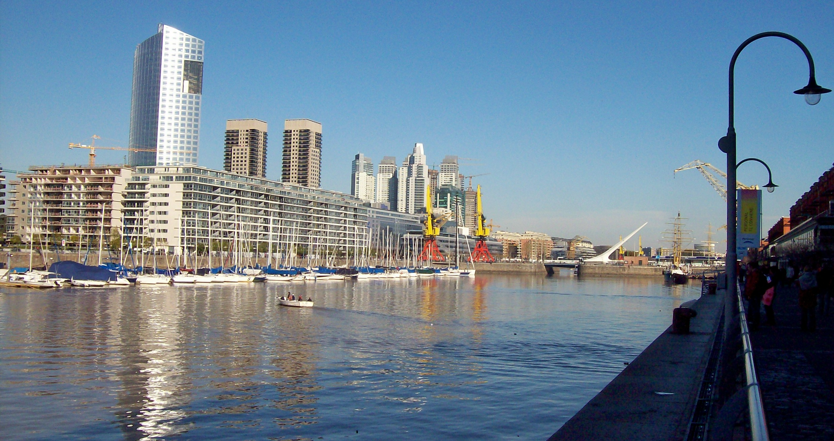 Dique 4 y al fondo Puente de la Mujer, Puerto Madero, Buenos Aires, Argentina.